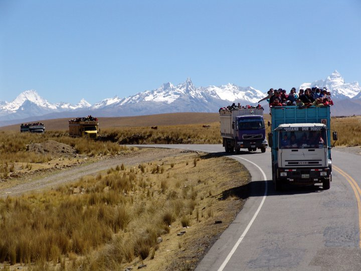 Oratorianos Don Bosco rumbo a Chimbote